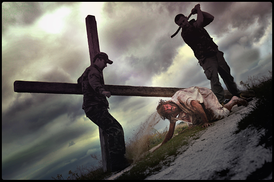 Trzeci upadek Jezusa